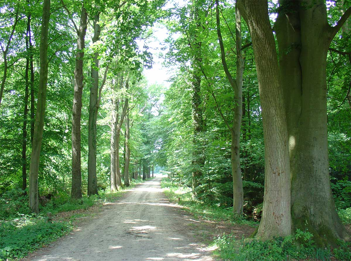 Zichtlaan in het Sterrebos van de voormalige Havezathe Oosterbroek bij Eelde